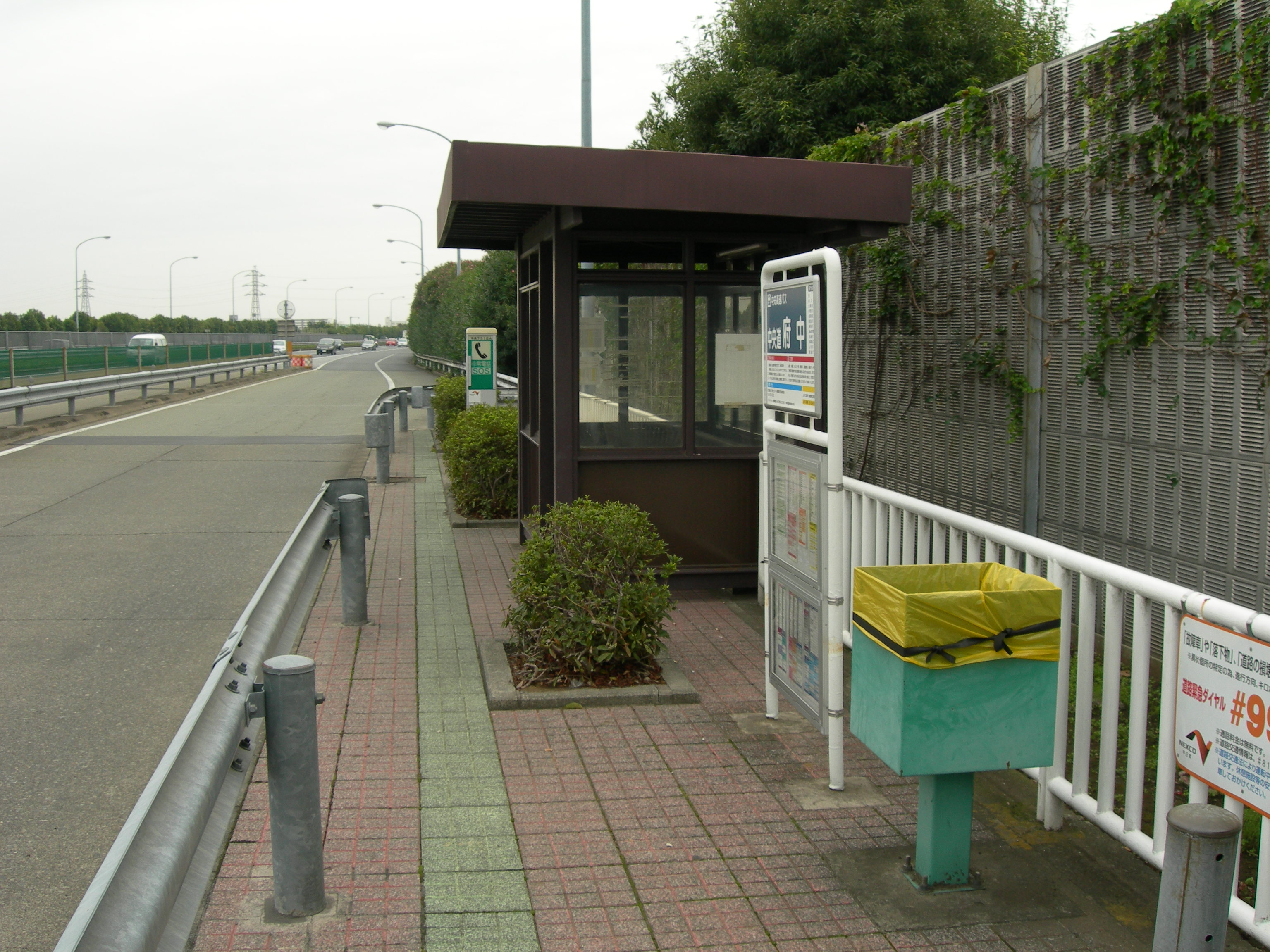 府中バスストップ